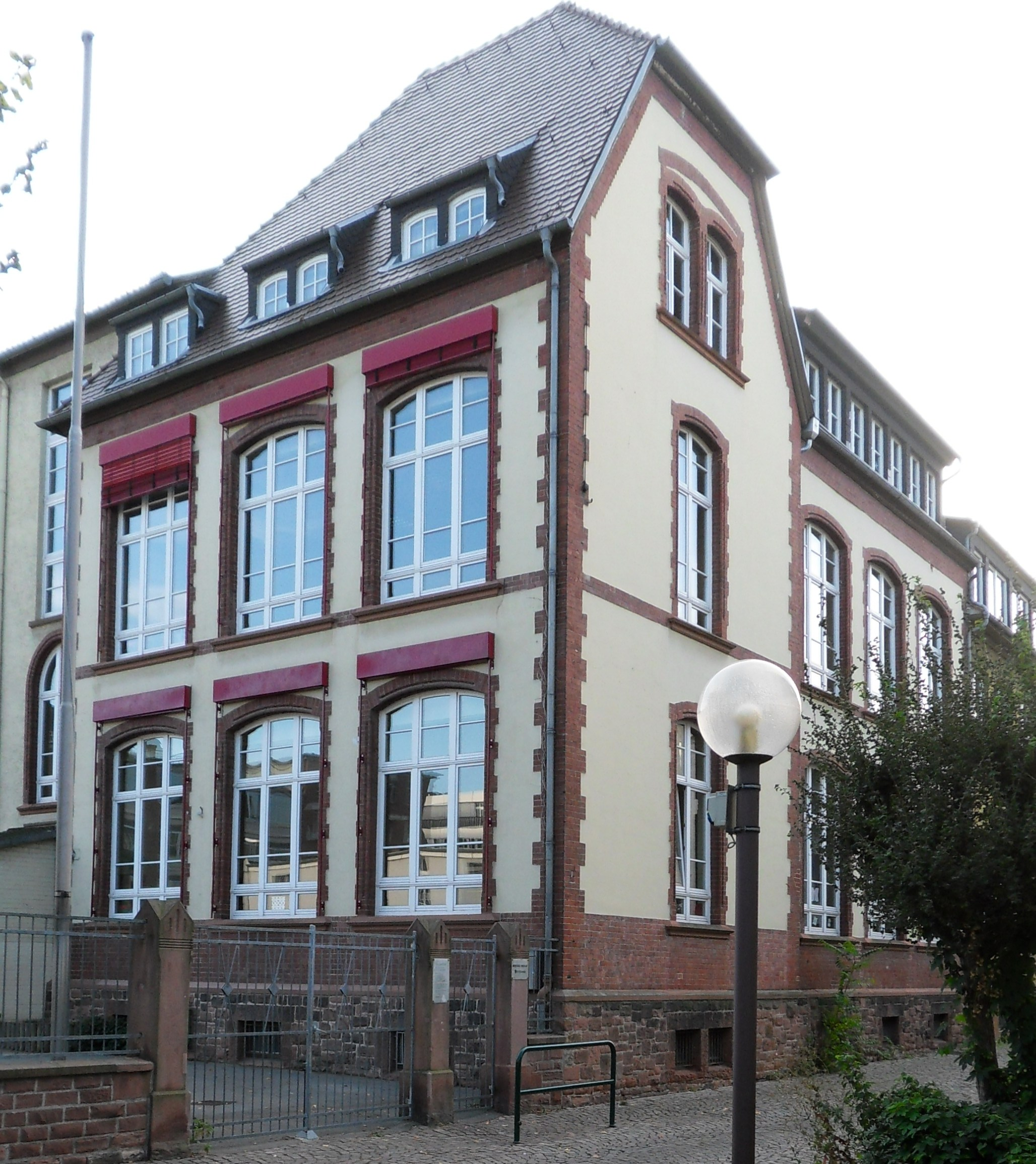 Grundschule in der Schulstraße von Rüsselsheim am Main; früher war hier das Immanuel-Kant-Gymnasium